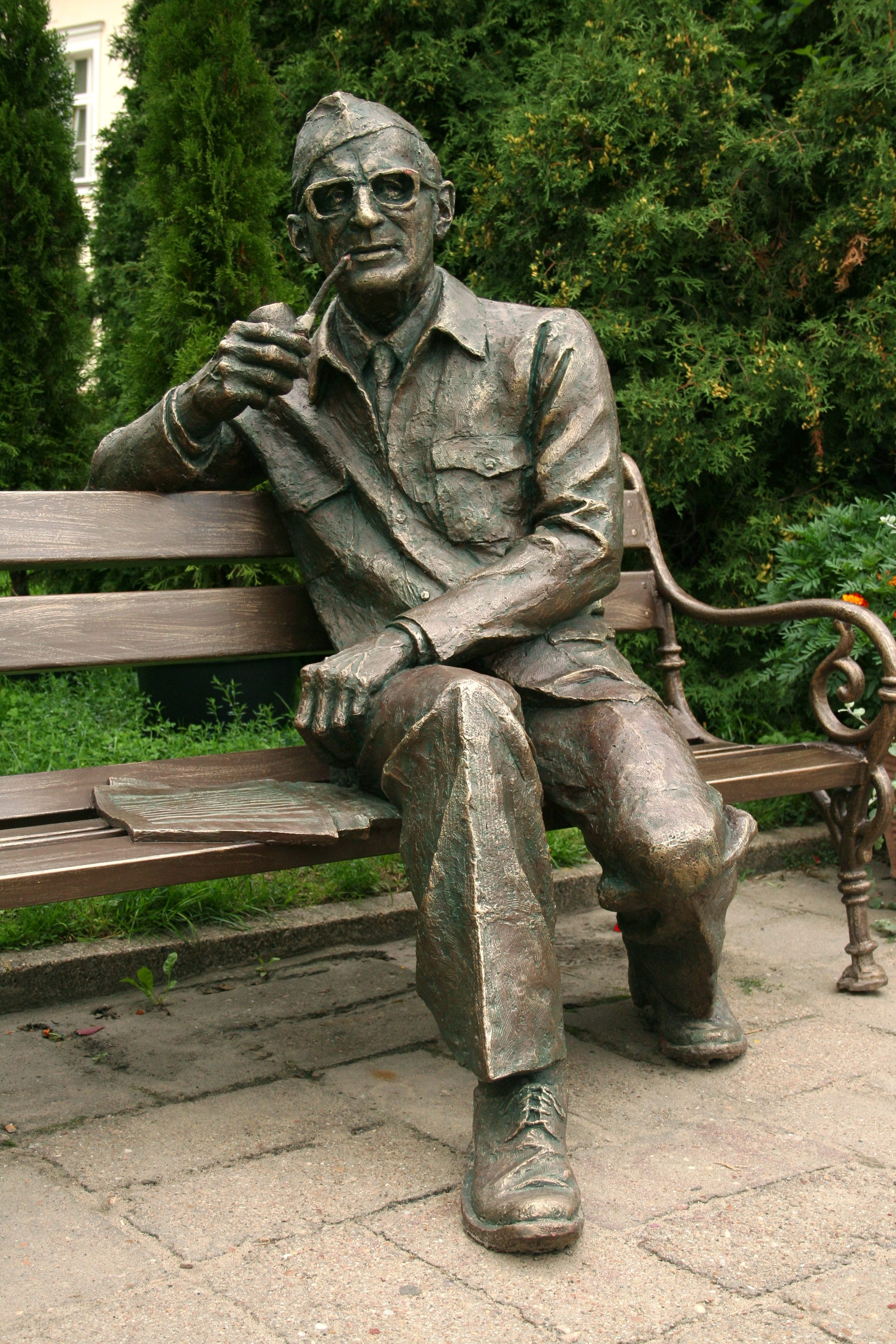 pomnik Stanisława Hadyny w Koszęcinie przed zamkiem, obecnie siedziba zespołu Śląsk